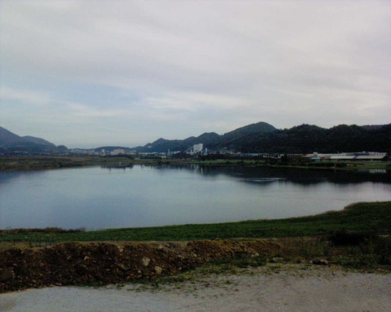 Družmirsko jezero (slikano proti Velenju- proti rudniku)